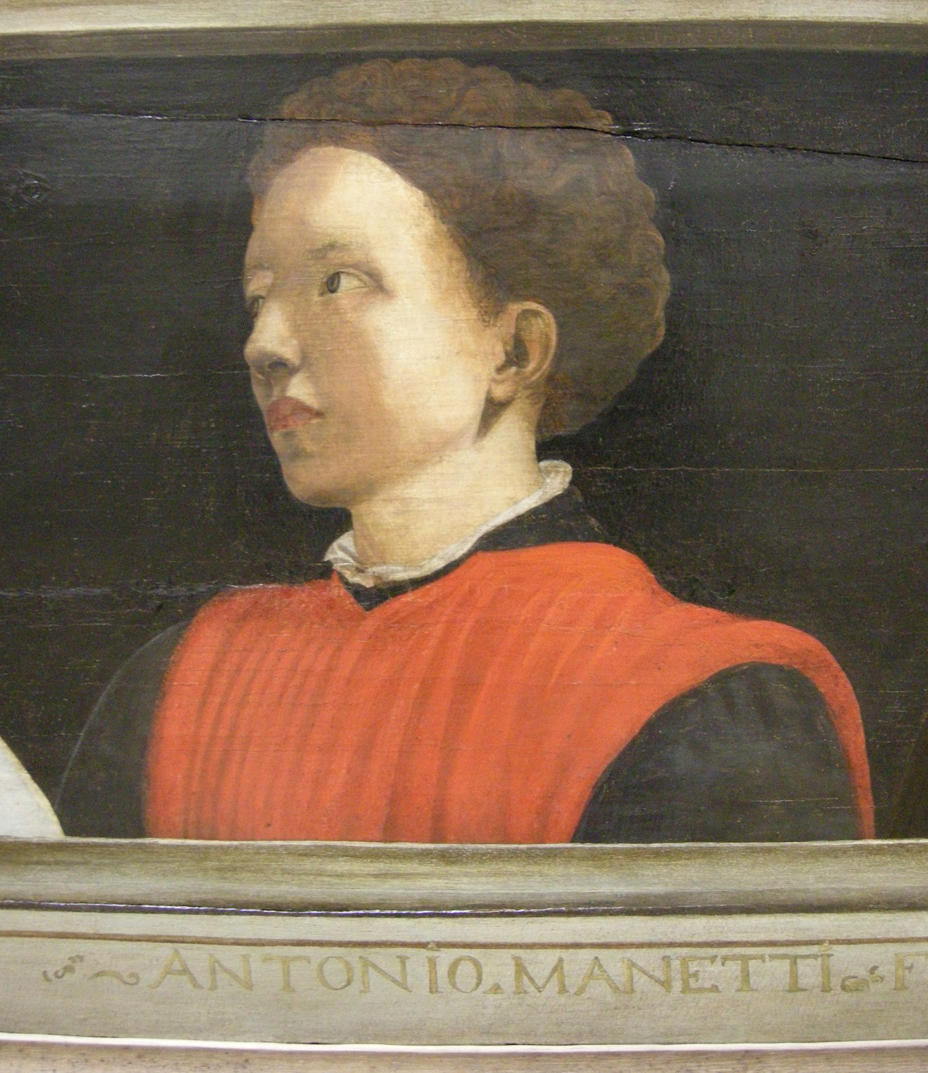 Cinque maestri del rinascimento fiorentino, XVI sec, antonio manetti.JPG